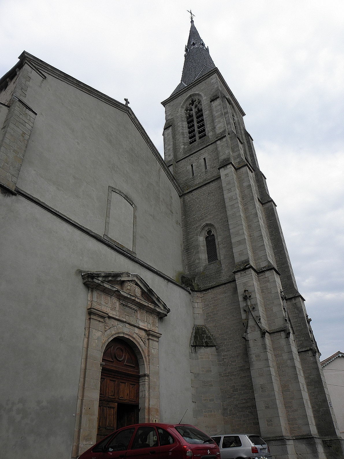 Façade occidentale de la cathédrale Saint-Sauveur de Vabres-l'Abbaye (12). .